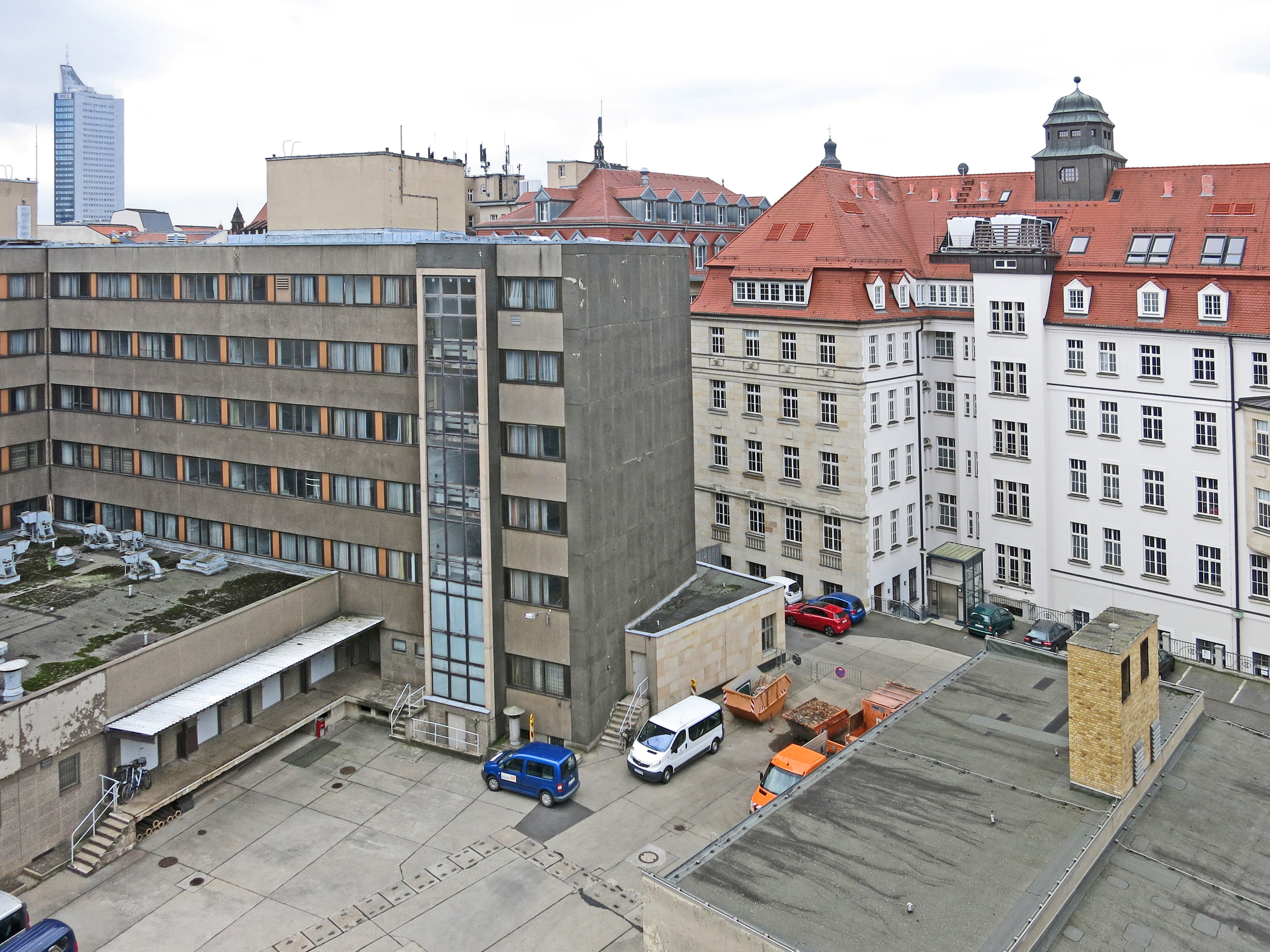 Nicht einsehbarer Innenhof der früheren MfS-Bezirksverwaltung Leipzig, rechts Altbau "Runde Ecke", Dittrichring; links Neubau von ca. 1978-1985, Große Fleischergasse 12, 04109 Leipzig